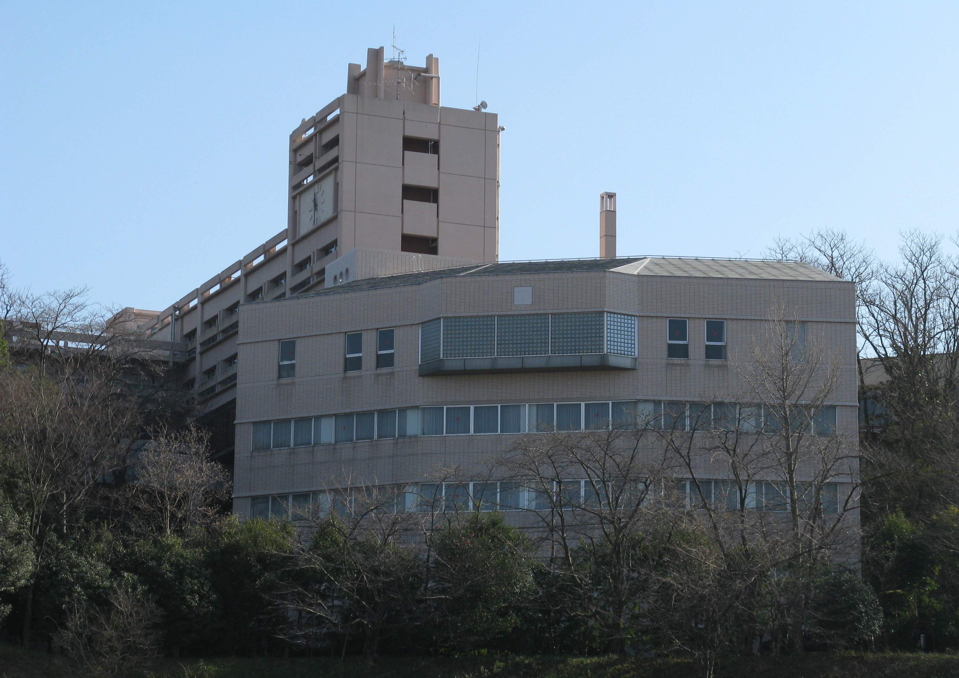 帝塚山学院大学 狭山キャンバス